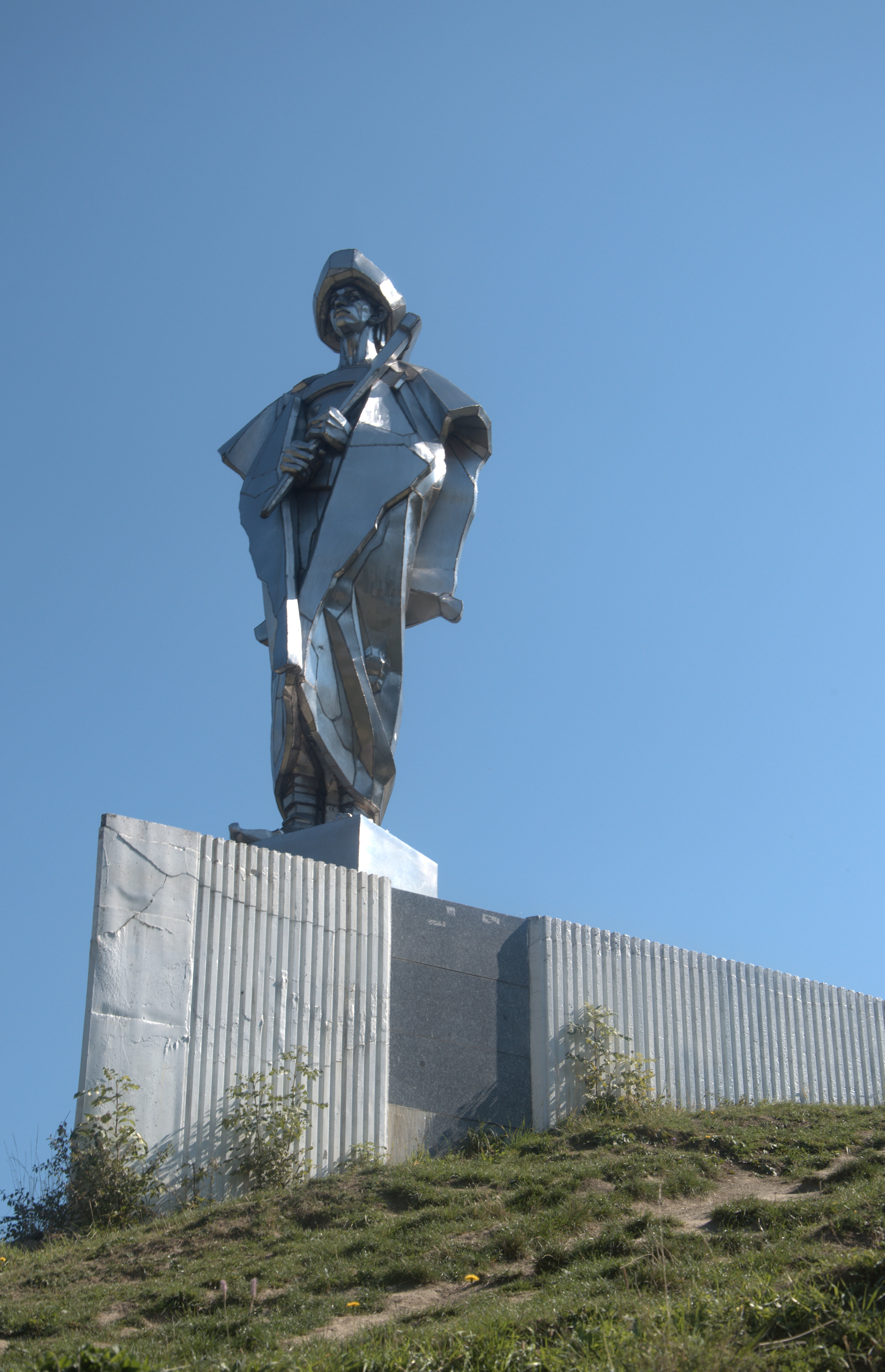 Janošik Statue in Terchová